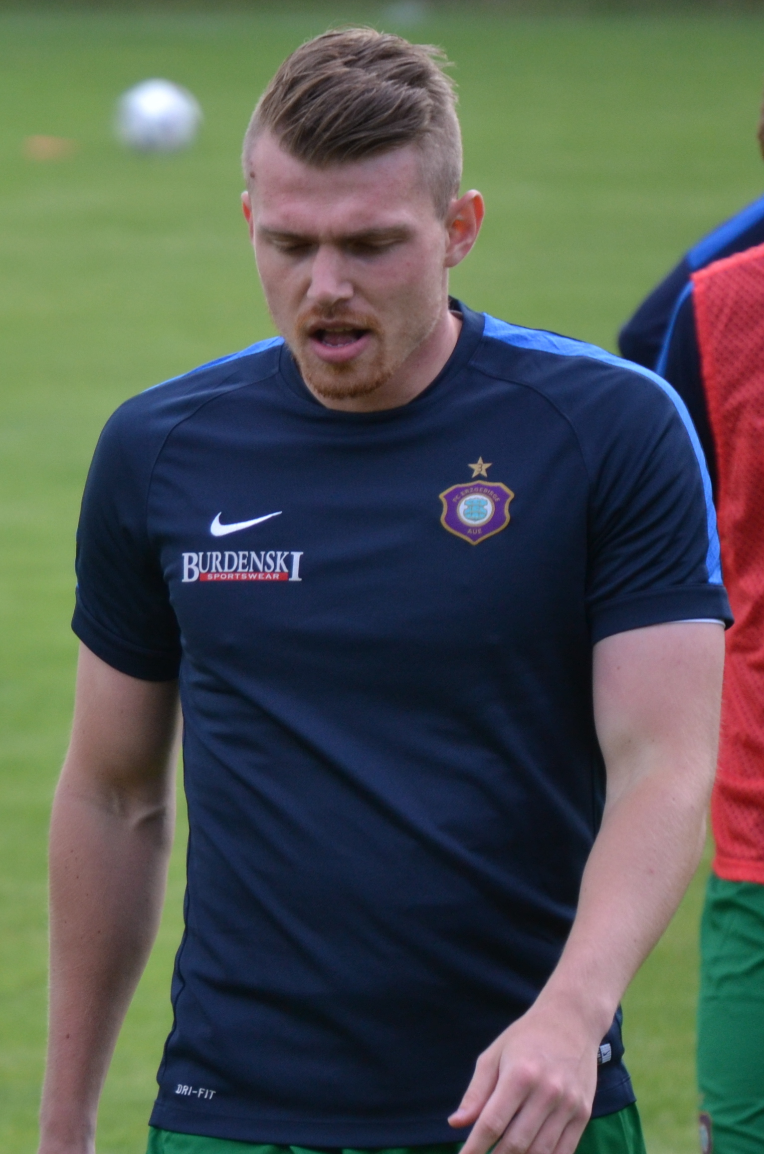 Steve Breitkreuz beim Aufwärmen für das Freundschaftsspiel zwischen Erzgebirge Aue und dem HFC Colditz im Juni 2016